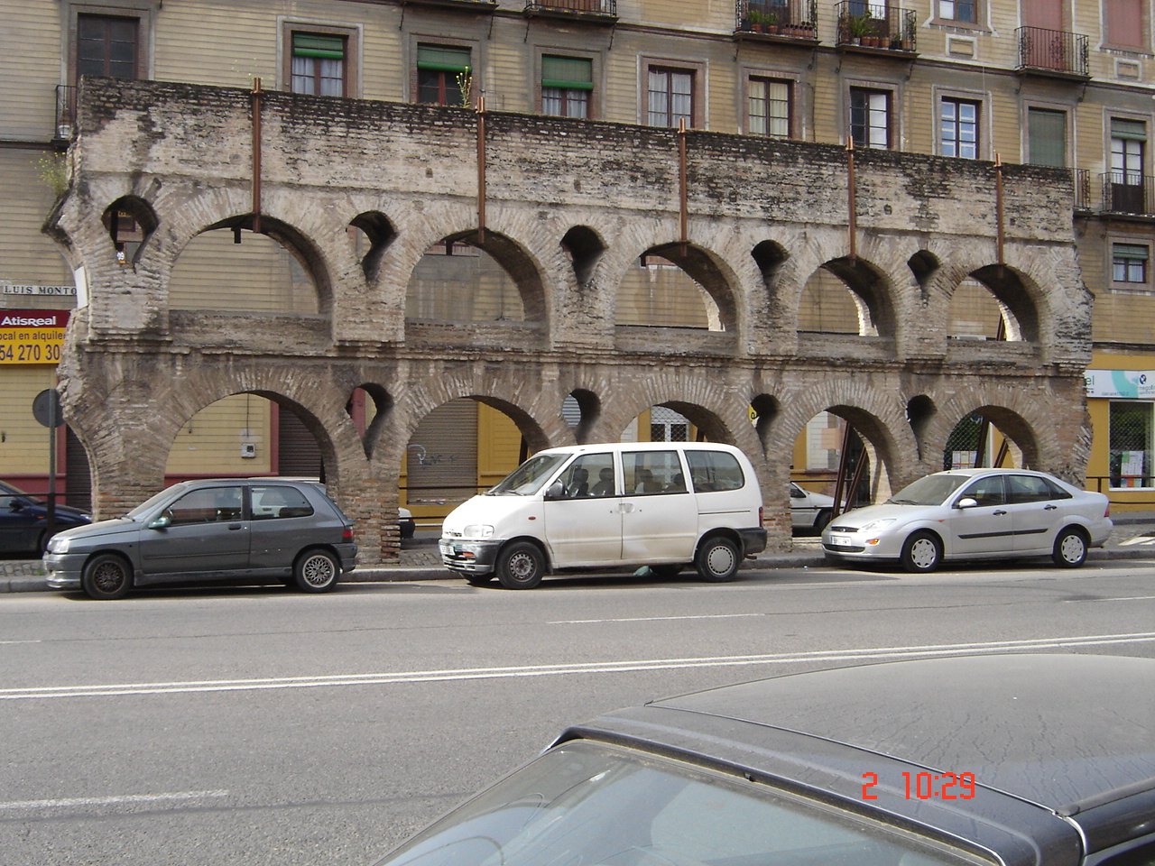 Restos del acueducto romano (la segunda arcada) conocido como "Caños de Carmona" de Sevilla